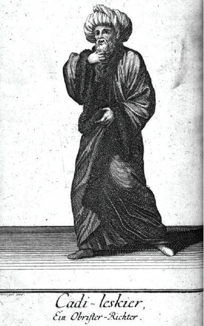 Illustrations from Herrn Baron von Tott's Nachrichten von den Türken und Tataren, Volumes 1 & 2, 1787